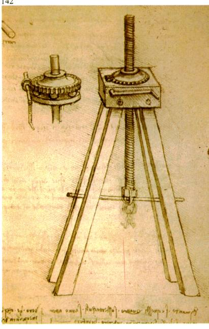 Mécanisme de vérin à vis dessiné par Léonard de Vinci (Codex Madrid I, f.26.r)